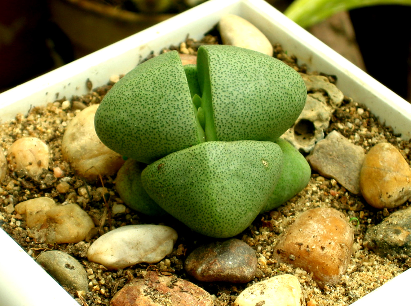 Pleiospilos nelii Autor/author:User:Anna